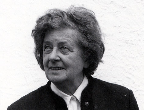 Mutz Harnest Originalfoto von 1980